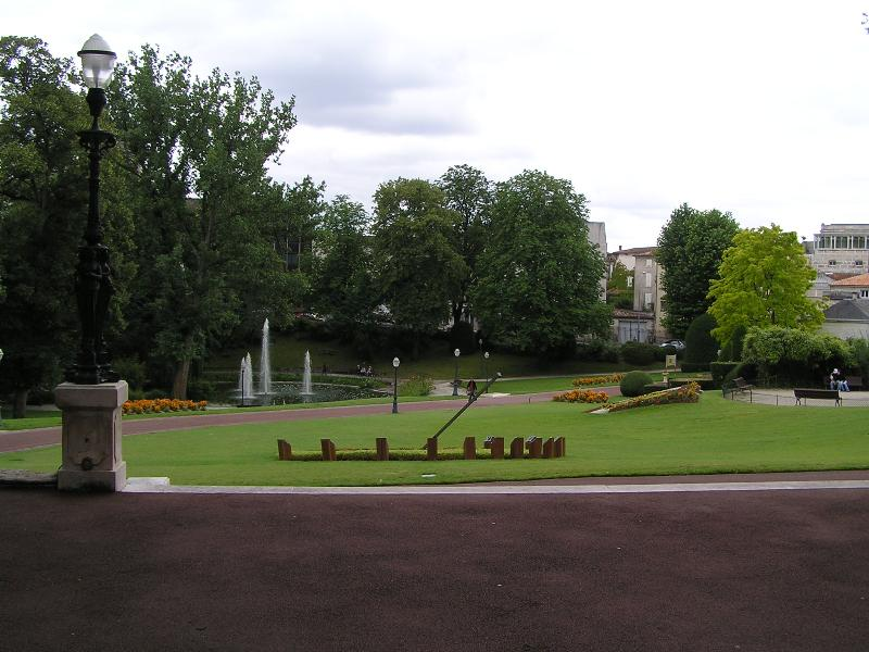 jardin public